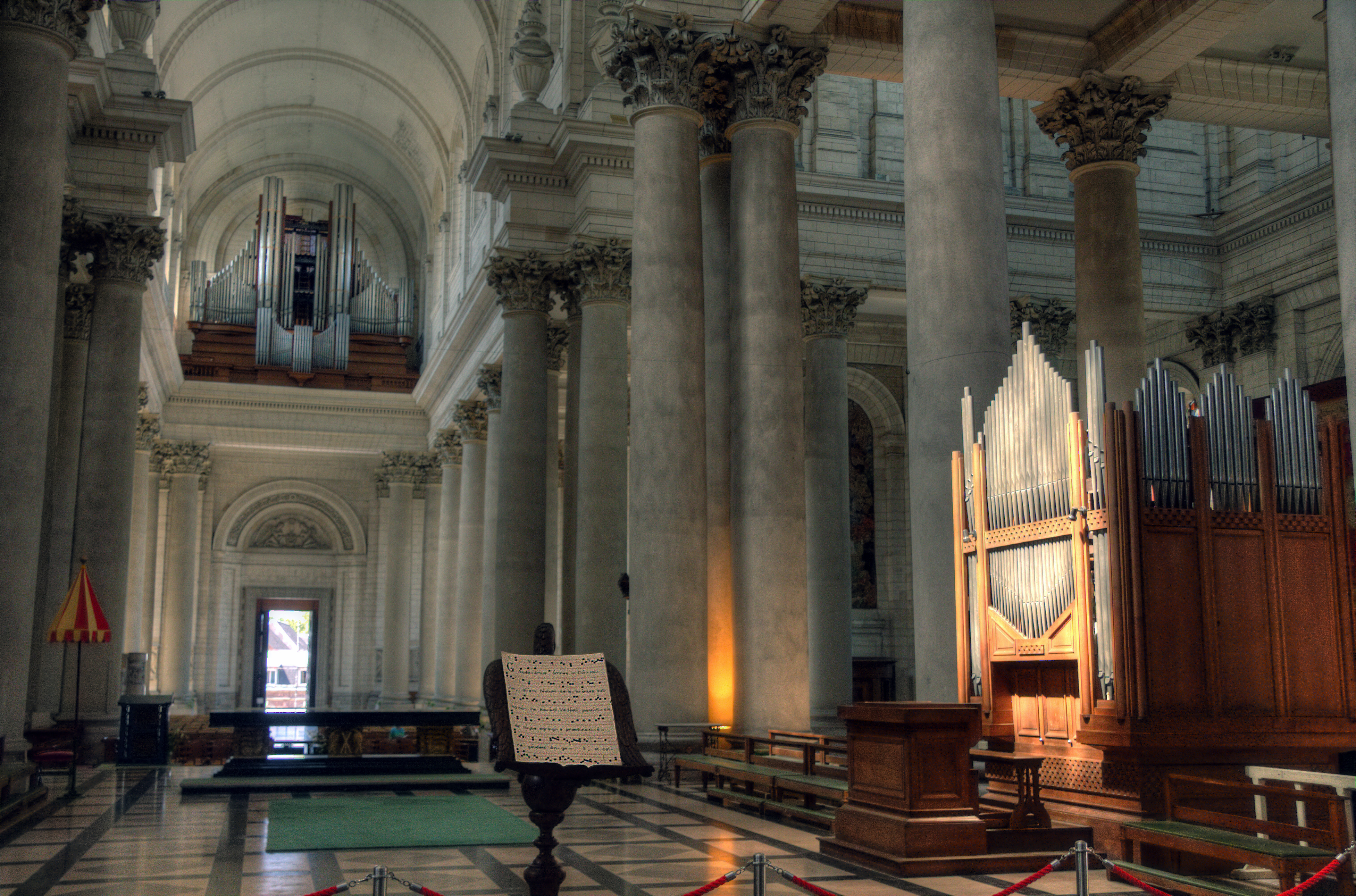 Les deux orgues de la cathédrale d'Arras